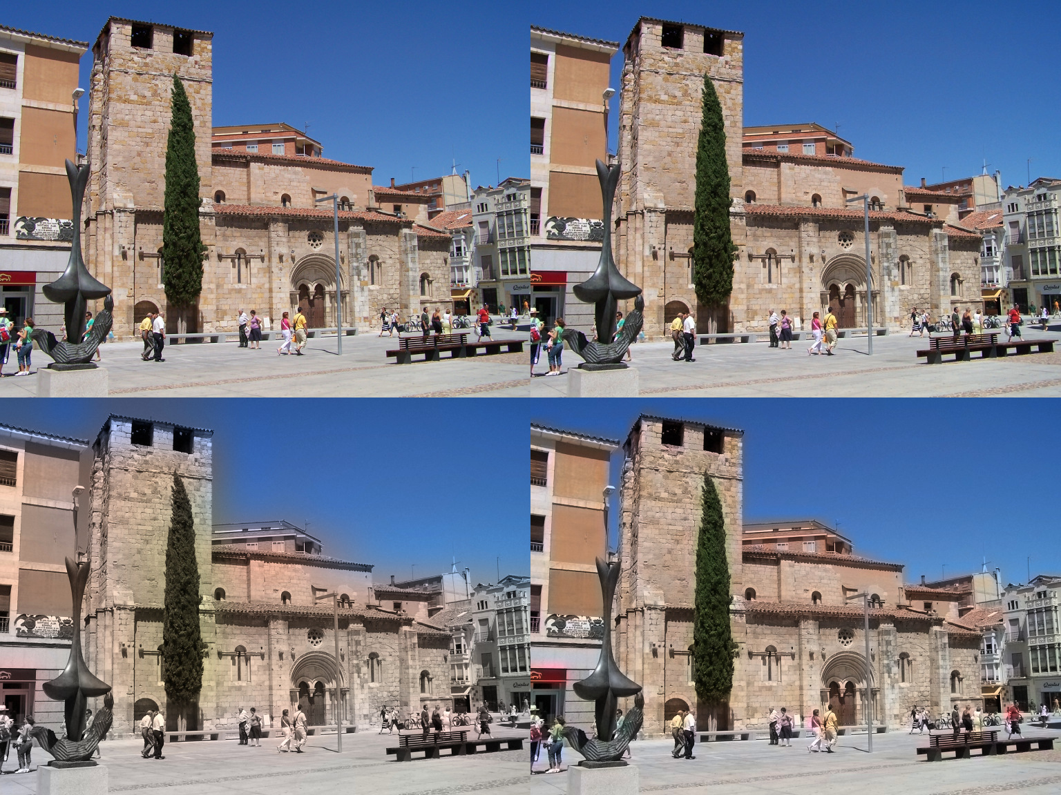 Efectos del submuestreo (Arriba izq. original, a su derecha la imágen donde la información del color se redujo a la cuarta parte en horizontal y vertical, debajo otra donde se redujo esa información a la dieciseisava parte y a su izquierda una imágen donde la información del color quedó en la sesentaycuatroava parte) Está guardada sin submuestreo de color, con lo que la primera imágen tiene los colores intactos.